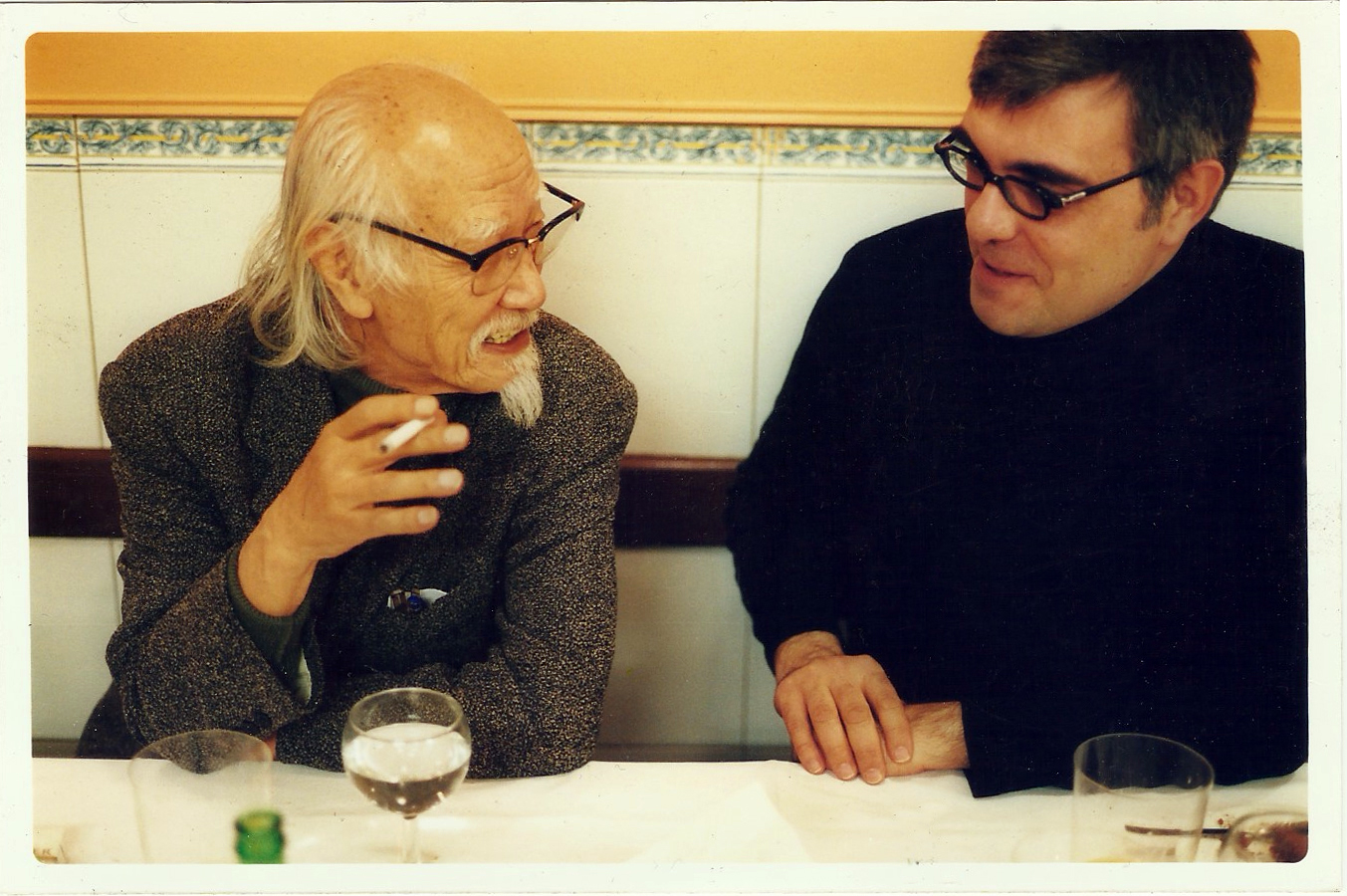 Seijun Suzuki & Carles Prats